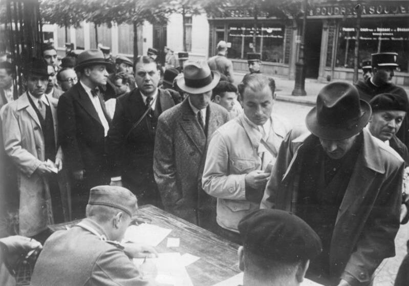 Zentralbild II. Weltkrieg 1939-45 Nach der Besetzung Frankreichs durch die faschistische deutsche Wehrmacht werden die nazistischen Rassengesetze auch in Frankreich eingeführt. Die Pässe festgenommener Juden in Paris werden geprüft. 8281-41 August 1941